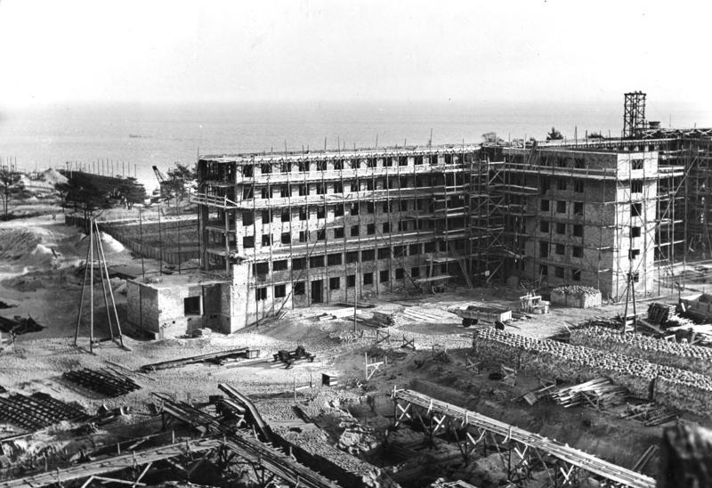 Prora, Bau des KdF-Seebades Das entstehende "KdF."-Seebad auf der Insel Rügen (Platz für 20 000 Urlauber) [Rügen, Prora.- Bau der Gebäude des KdF-Seebades an der Ostsee]